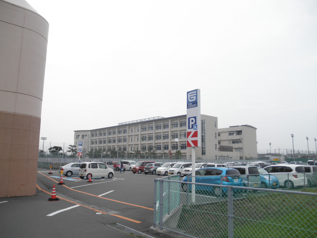 富岡東中学校・高等学校